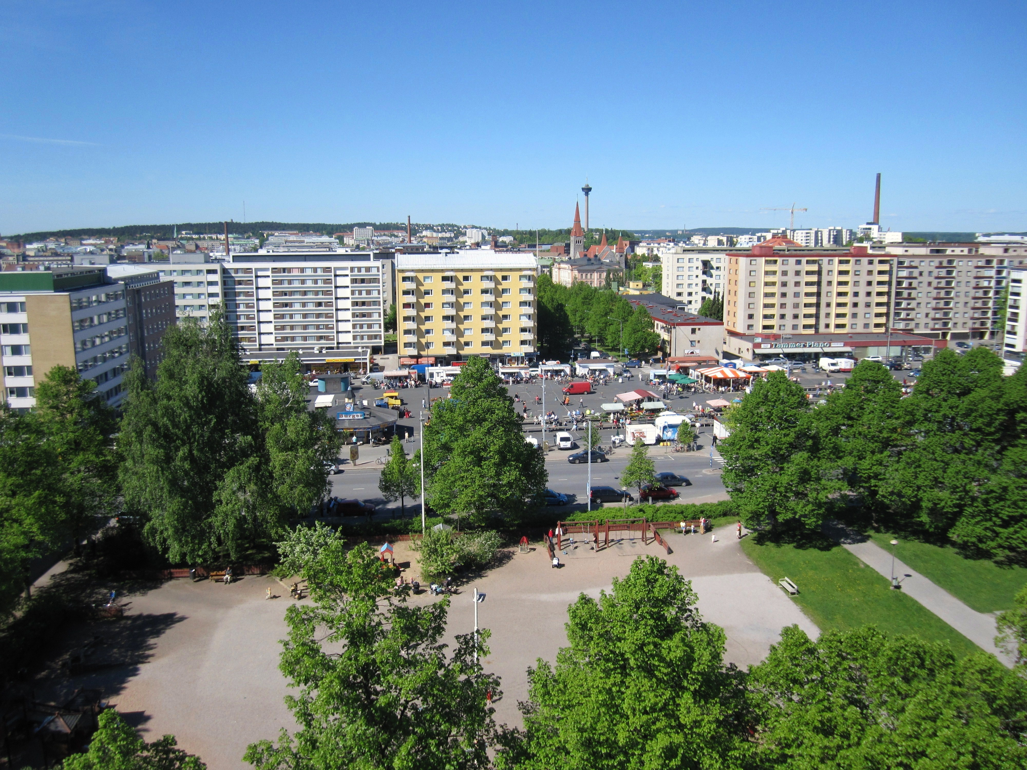 Tammelantori kesällä 2010 idästäpäin kuvattuna.